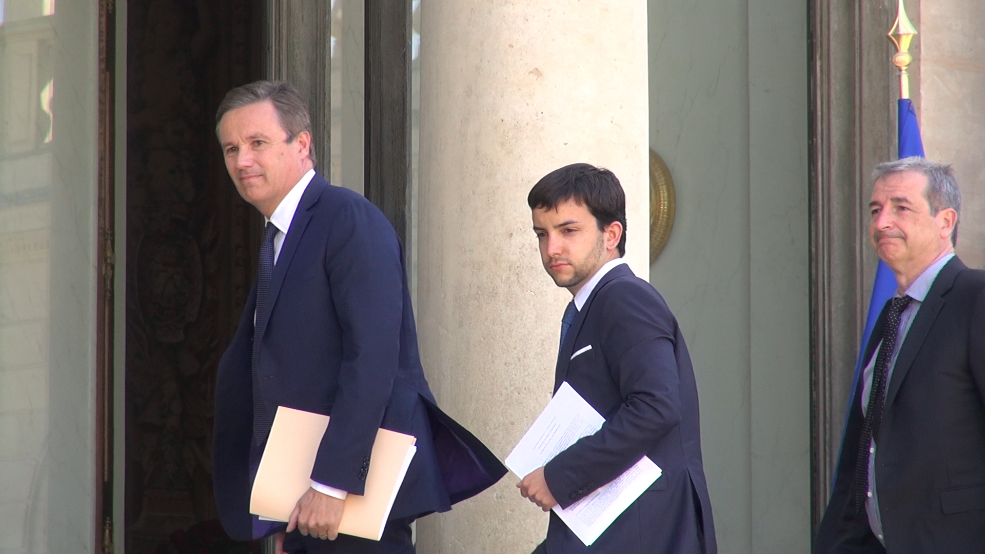 Nicolas Dupont-Aignan et ses conseillers reçus à l'Elysée